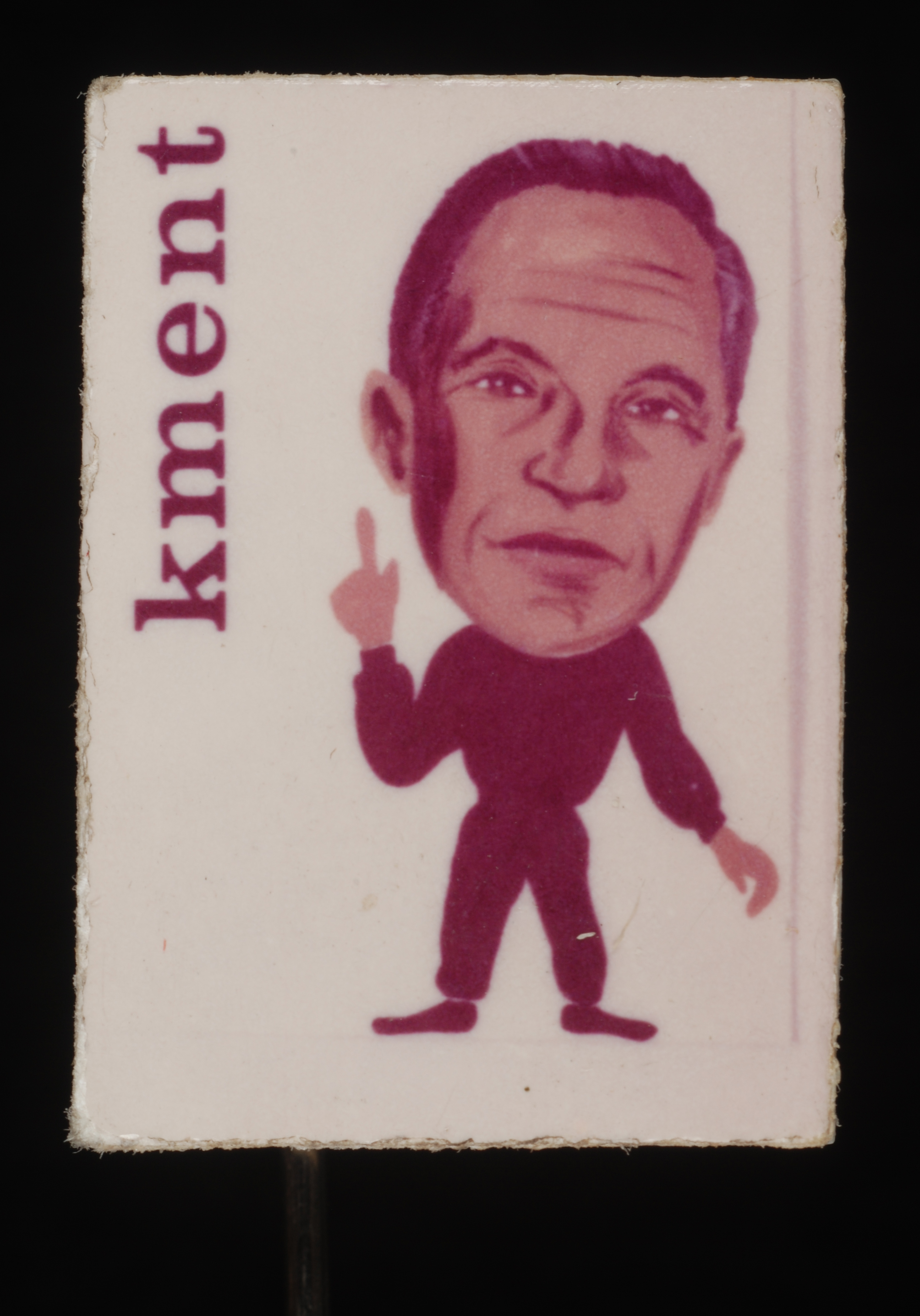 Objectgegevens Titel: Reclamespeldje met trainer Kment Beschrijving: Reclamespeld uit een album vol met speldjes, vooral met voetballers er op. Trefwoorden: speld, reclameMateriaal: , informatievorm Opschrift / merk: "kment" Datering: 1965 - 1966 materiaal kunststof, metaal Afmetingen: (cm) hg 4,7 / br 1,3 / dp 0,3 Associatie: reclame, sparen, verzamelen, sport, voetbal, trainer, elftal, Feijenoord, Rotterdam Vorm & decoratie: reclamespeld, karikatuur Inventarisnr: Museum Rotterdam 63997-M.1